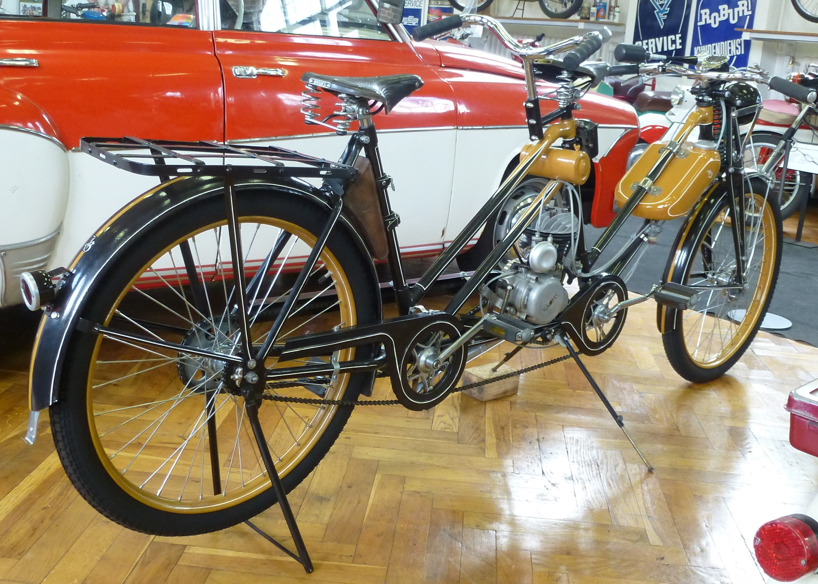 Cito Tandem-Motorrad 11935